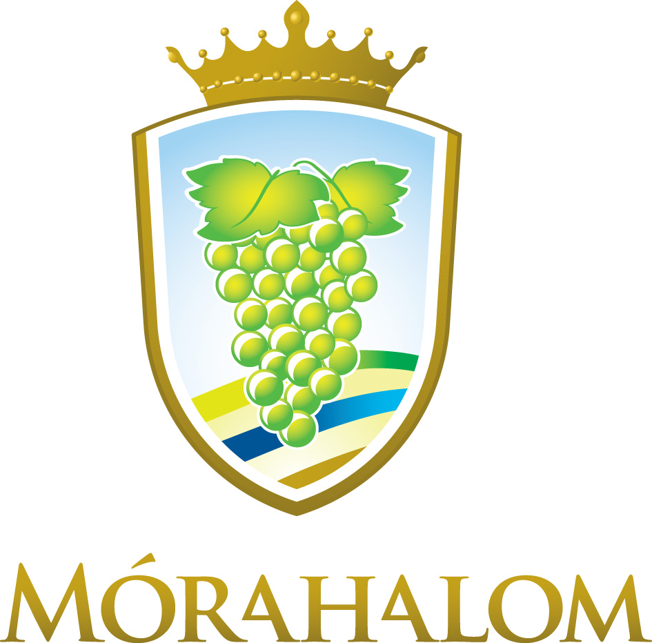 Mórahalom város hivatalos címere